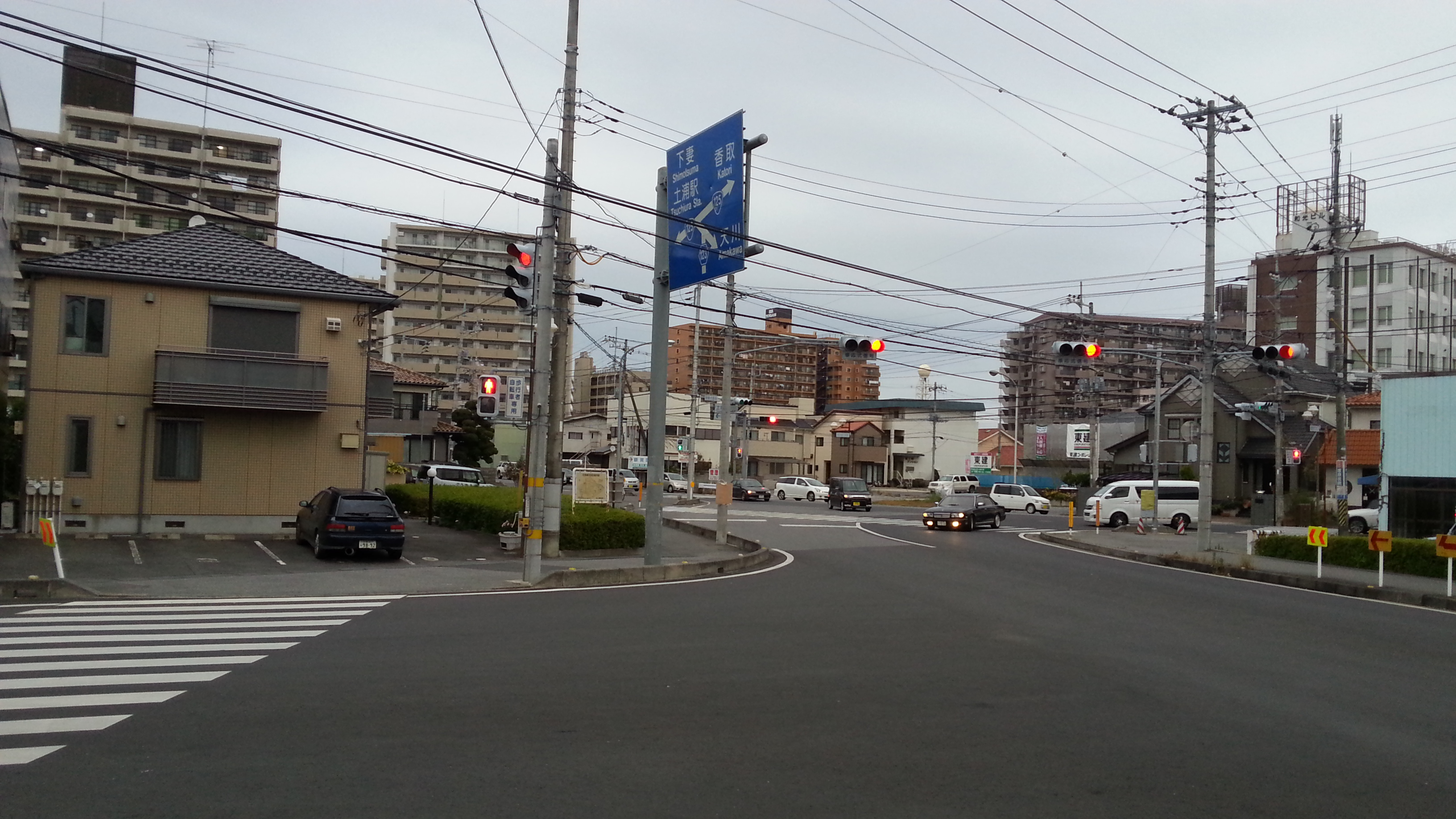 土浦市富士崎